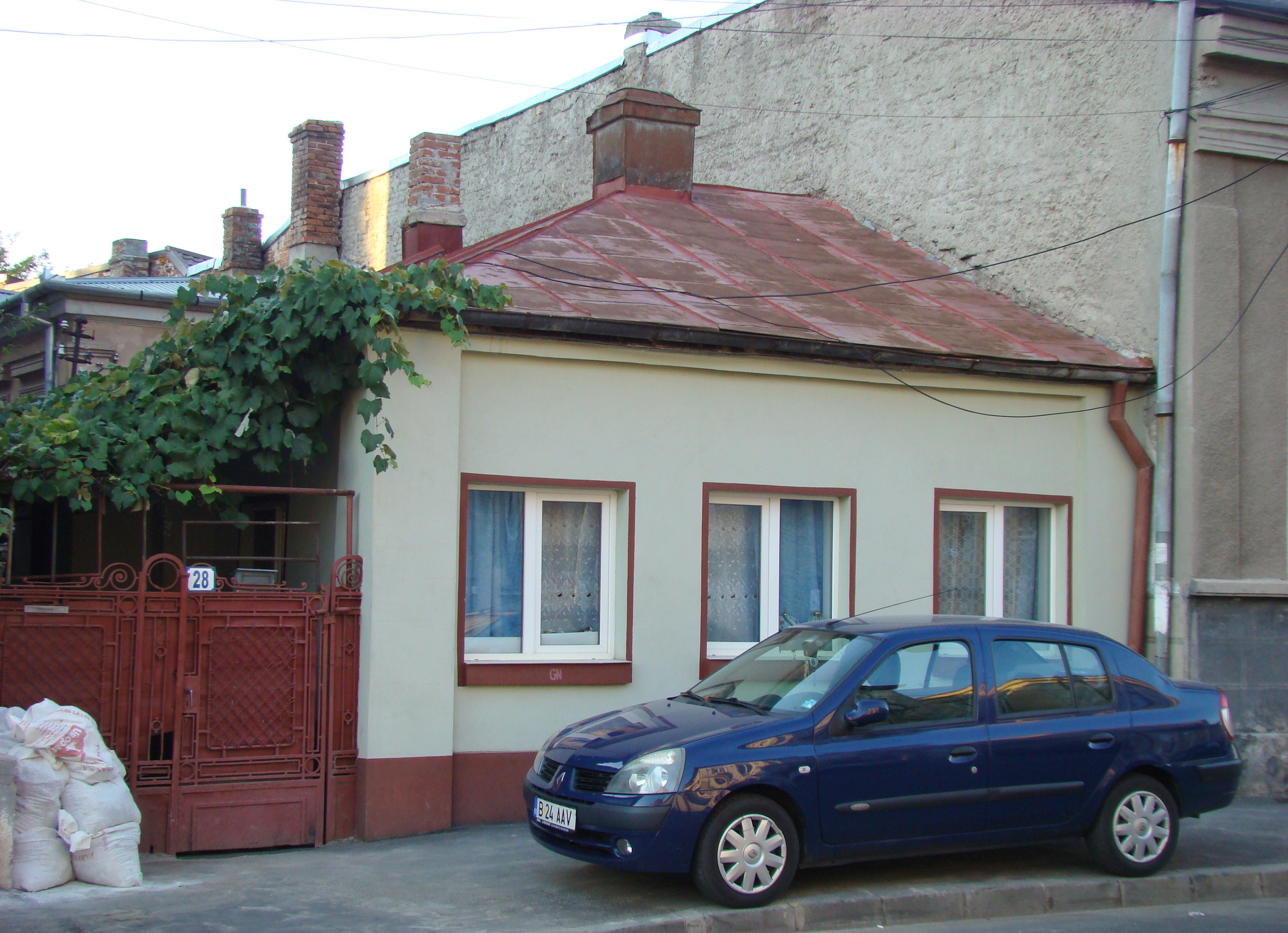 Clădire monument istoric, str. Mircea Vulcănescu, nr.28